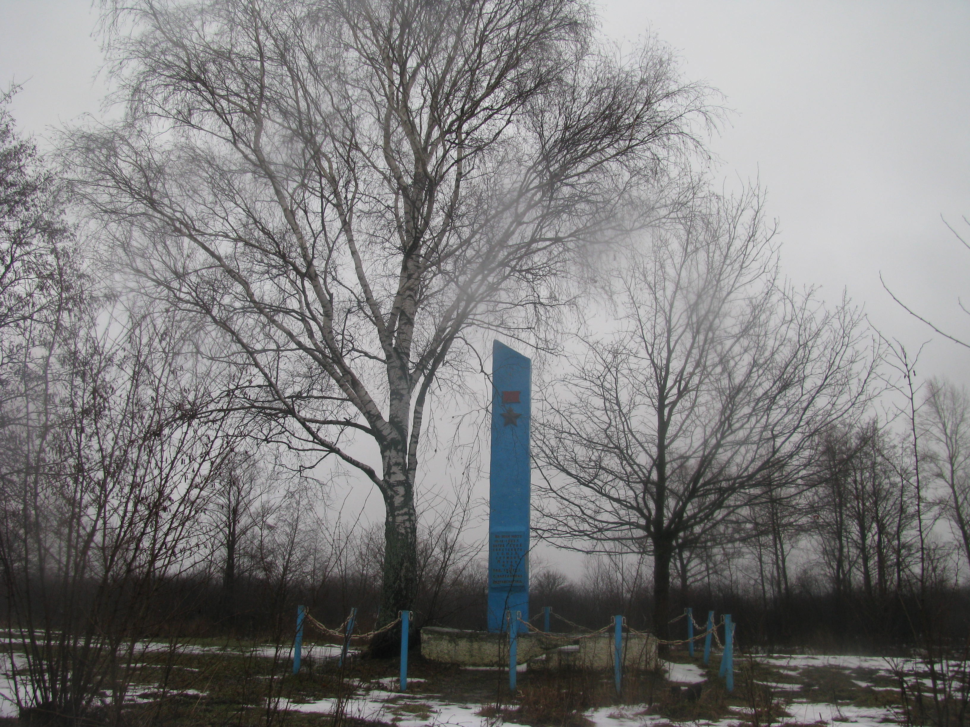 Памятник Герою Советского Союза Махову Н.Ф. возле деревни Жиличи, Брагинского района Гомельской области